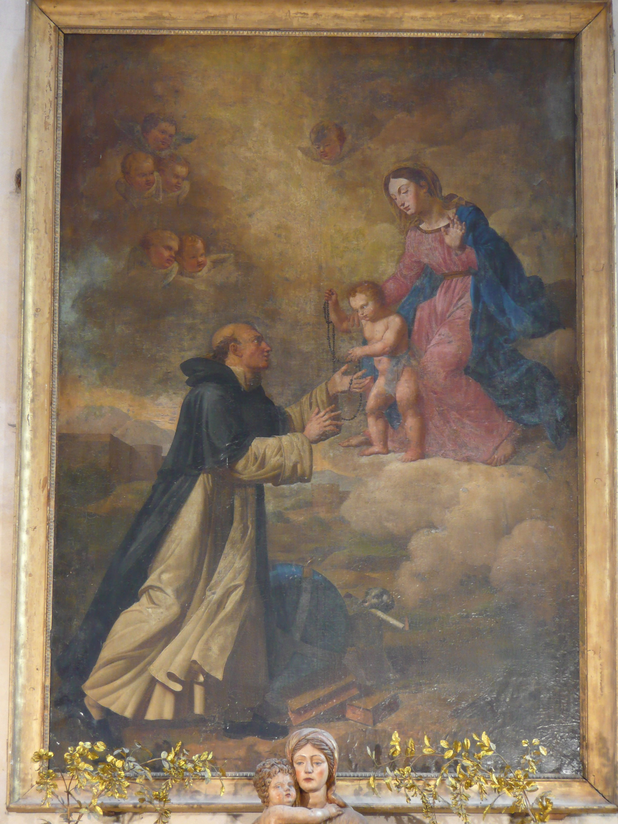 Toulouse (Haute-Garonne, France), église des Jacobins, chapelle St Dominique, toile, malgré ce qu'en dit la notice des monuments historiques, de Pierre-Théodore Suau (1789-1856), fils de Jean Suau, datant de la première moitié du 19e siècle, représentant la Vierge à l'Enfant remettant le Rosaire à St Dominique.